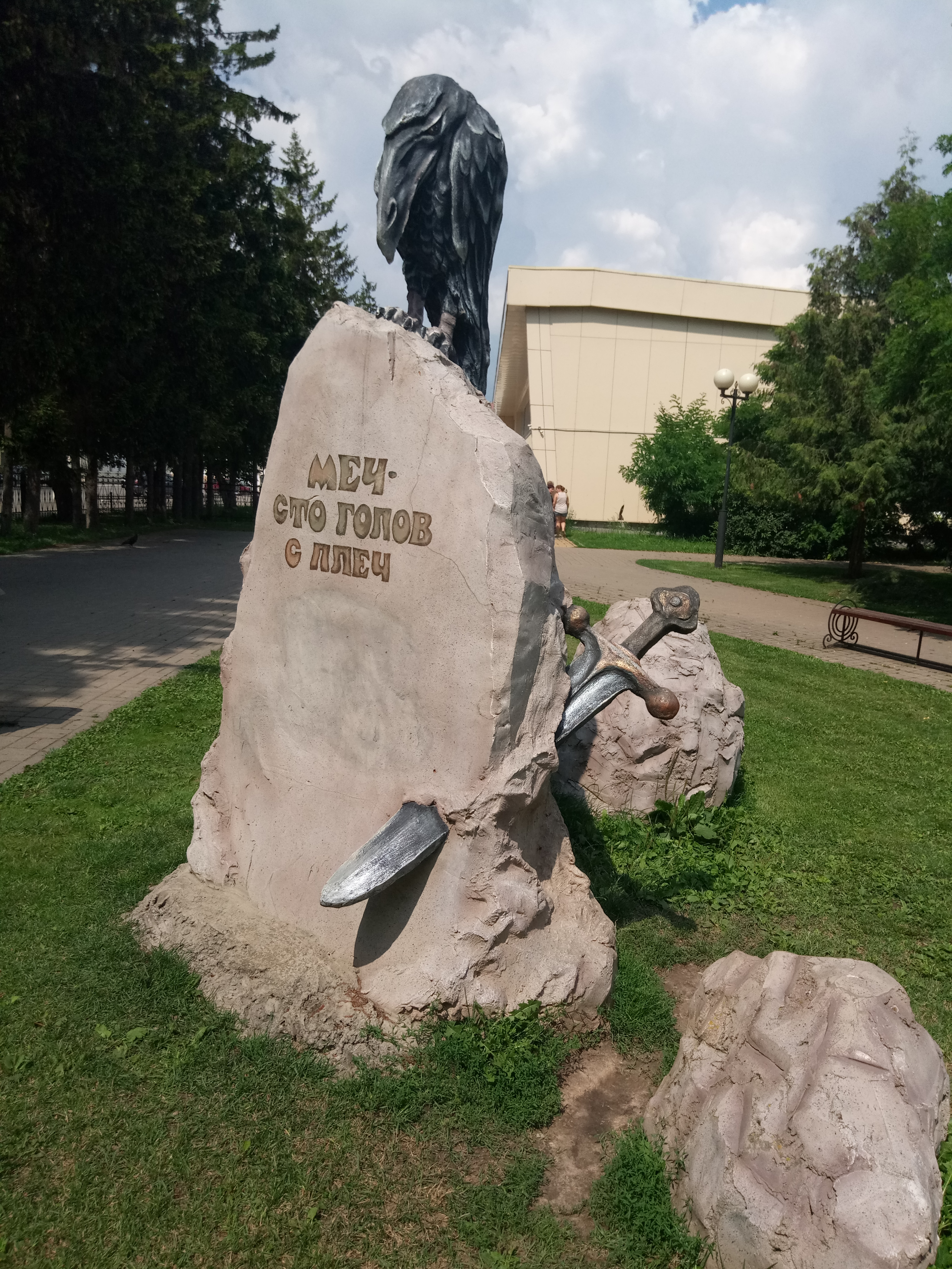 Меч-кладенец в Козельске